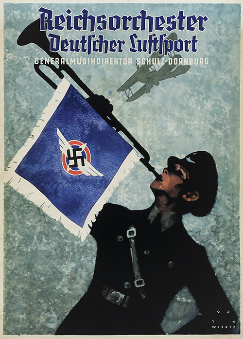 Plakat in den Maßen circa 89,3 x 63,8 cm, gedruckt von Röderdruck Leipzig, entworfen 1934 von Jupp Wiertz für den Deutschen Luftsport-Verband (DLV) mit Sitz in Berlin. Hinter dem Text „Reichsorchester // Deutscher Luftsport // Generalmusikdirektor Schulz-Dornburg“ ist ein fliegender Doppeldecker zu sehen, im Vordergrund ein junger Mann in Uniform, mit Trompete und Banner des Verbandes mit einem Hakenkreuz ...